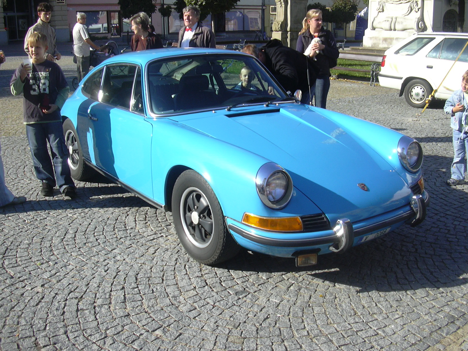 Porsche 911 (nejspíš T Coupé)